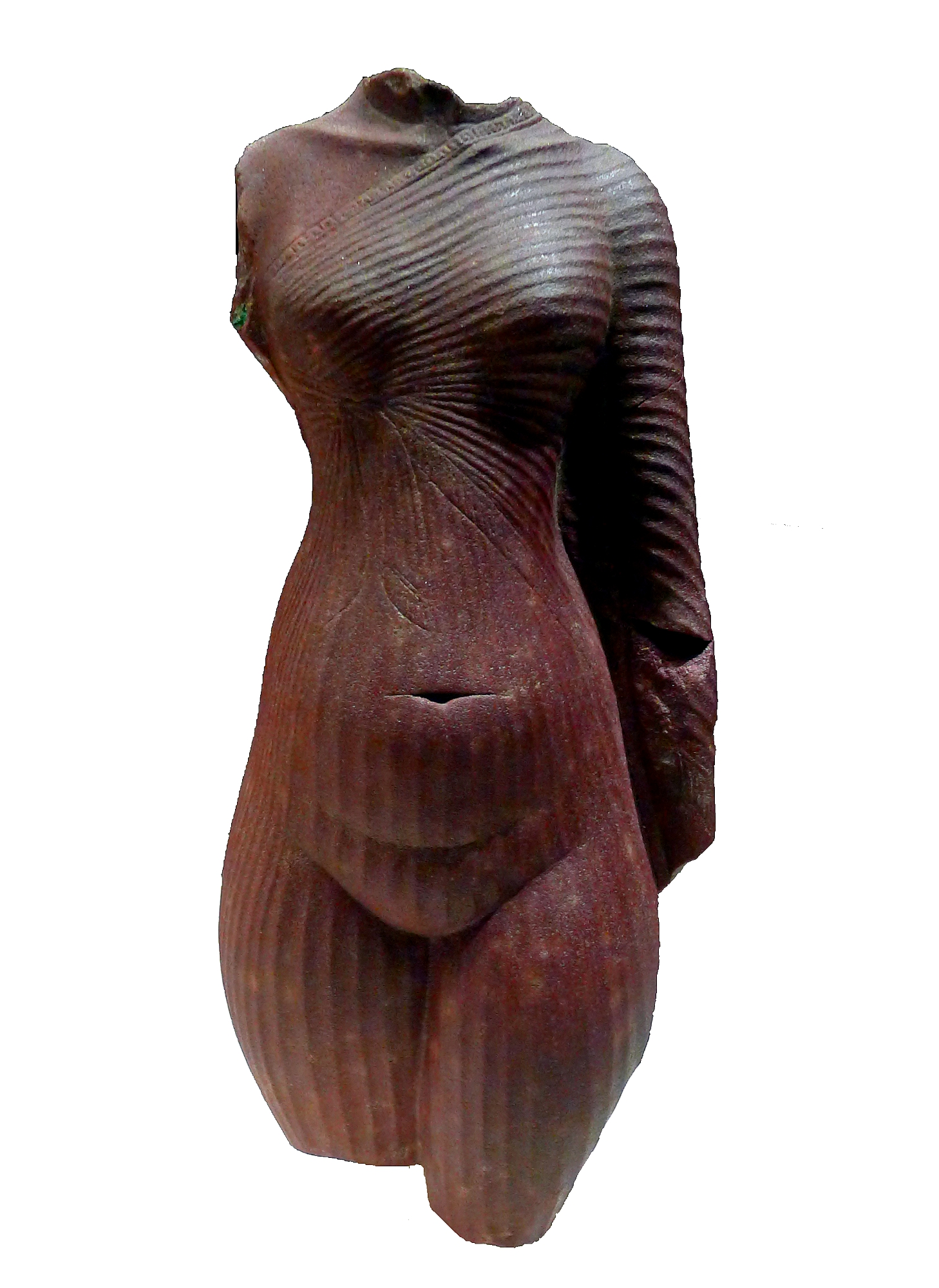 Corps de femme (probablement celui de Néfertiti)